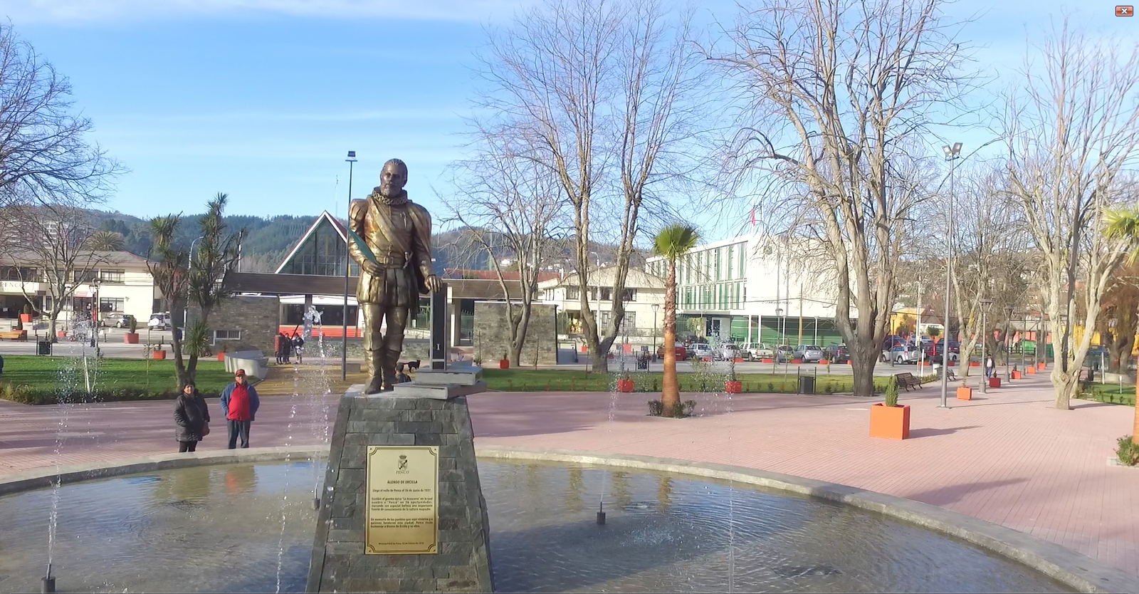 Plaza de Pencop